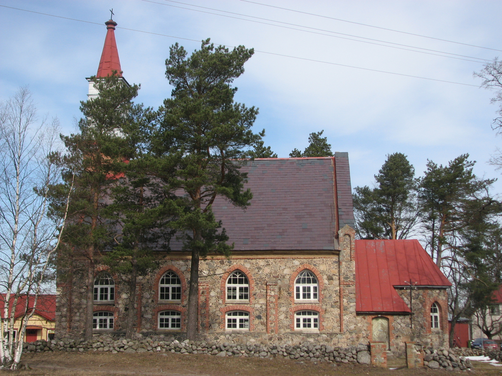 Häädemeeste St. Michaels Church, Häädemeeste, Estonia. Year 2008